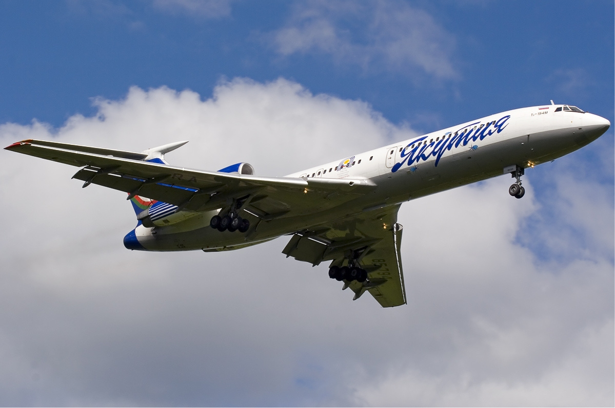 Yakutia Airlines Tupolev Tu-154M